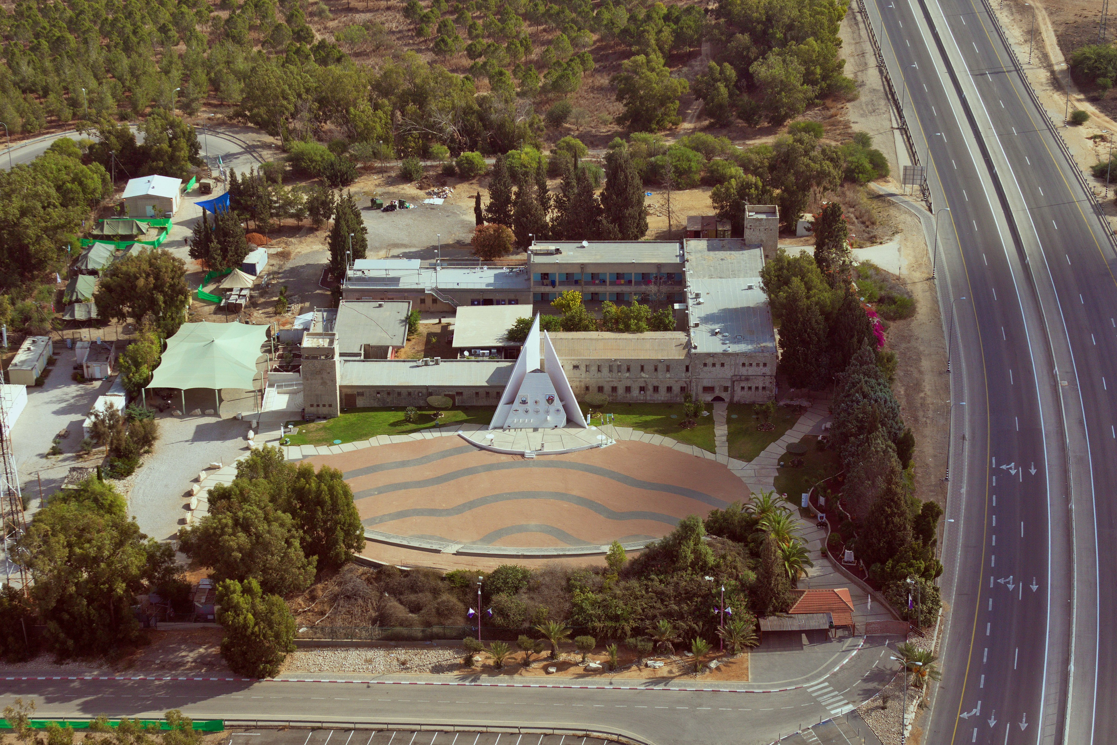 משטרת עיראק סווידאן היא מצודה החולשת על צומת דרכים מרכזי בדרום מדינת ישראל, על כביש 35, ליד שדה יואב. המצודה ידועה בלחימה הקשה שנדרשה לשם כיבושה במהלך מלחמת העצמאות. לאחר כיבושה נקראה המצודה "מצודת יואב".